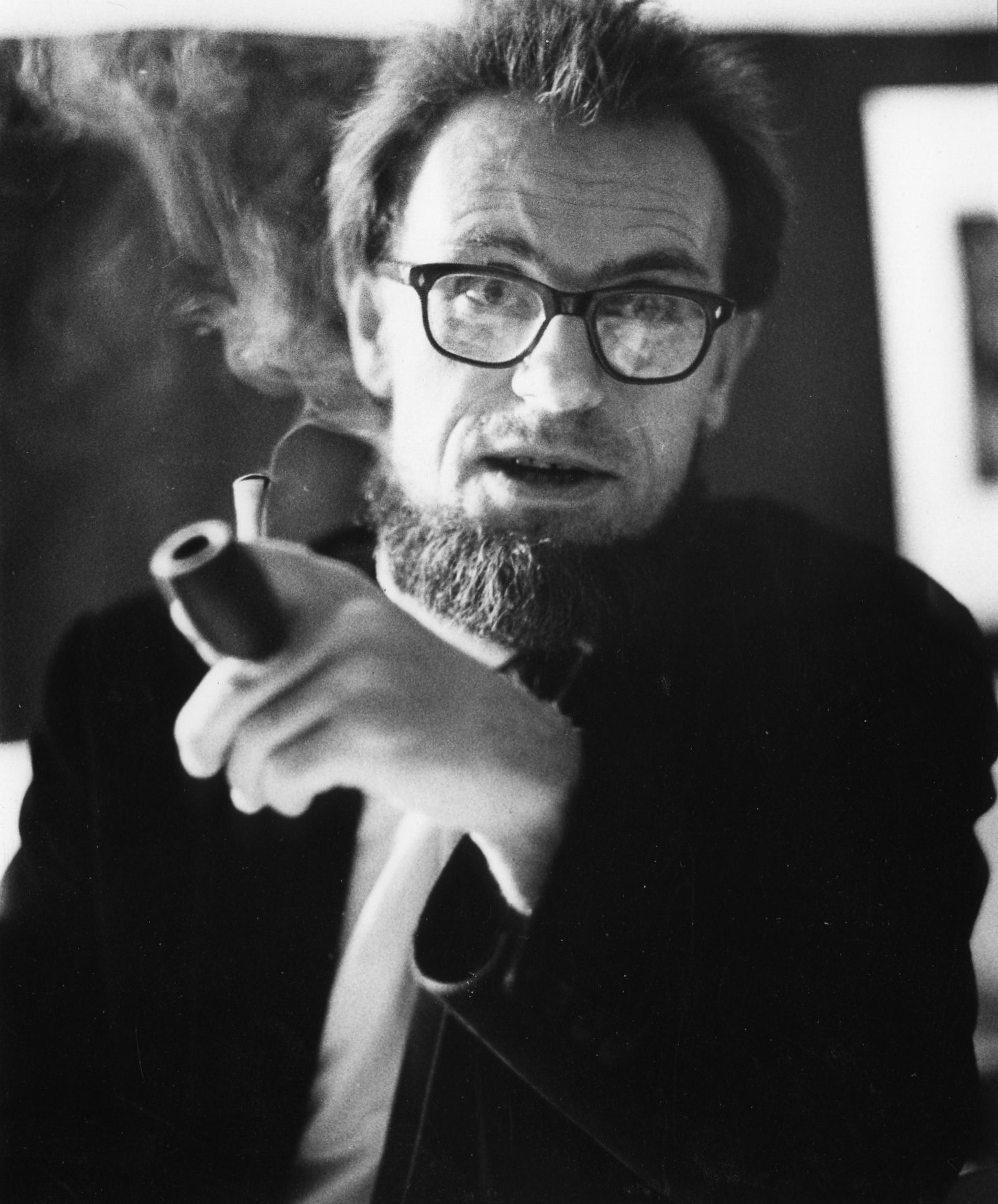 Foto Georg Gessler